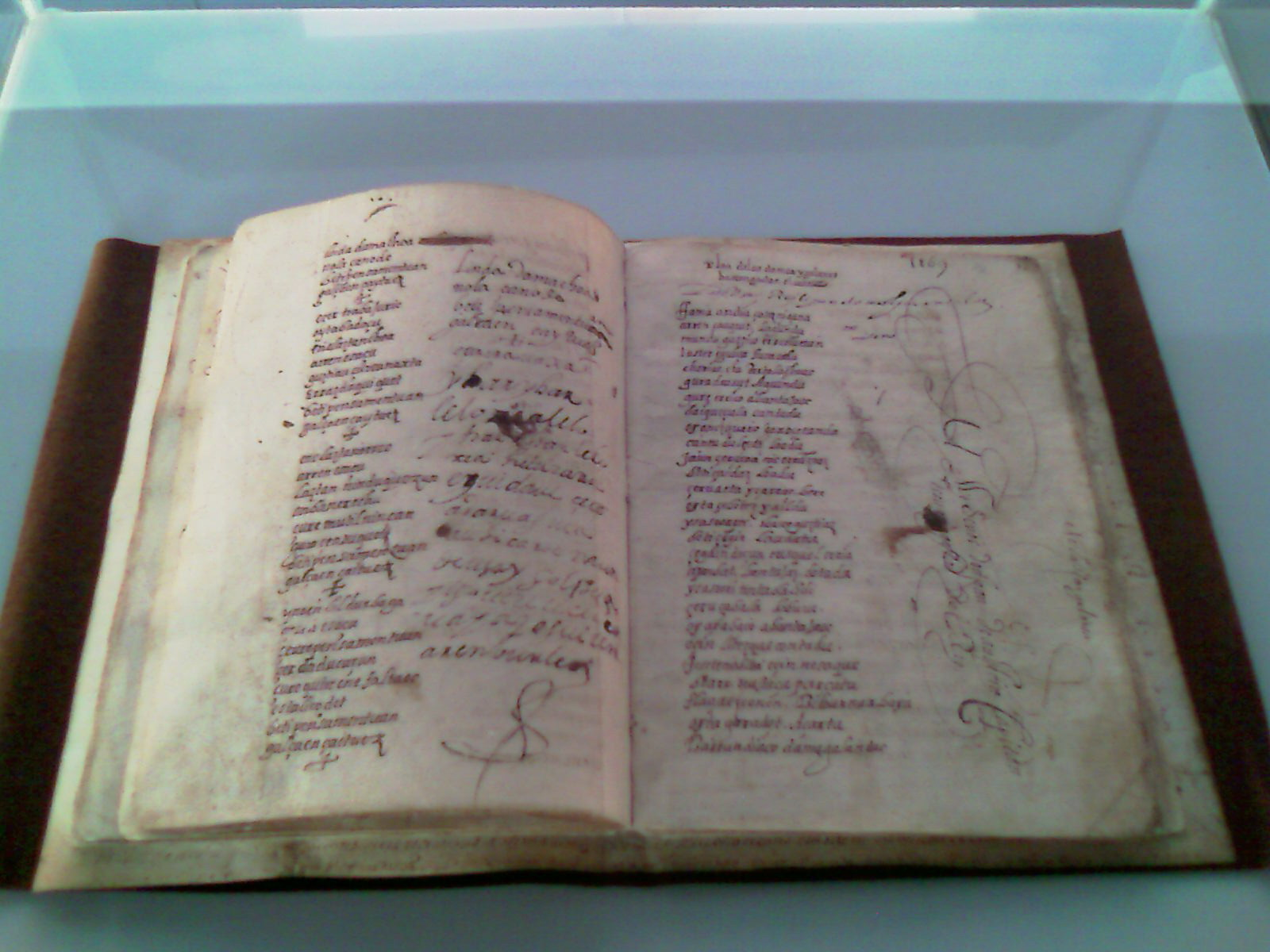 XVI. mendeko eskuizkribua, euskarazko artzain nobela baten zatia eta zenbait poema biltzen dituena, gehienak euskaraz idatziak. 2004an aurkitu zen eta Gipuzkoako Foru Aldundiak erosi zuen ( Argazkia Gasteizko BiBat museoan aterata dago, 2009ko uztailaren 29an ireki zen erakusketan.